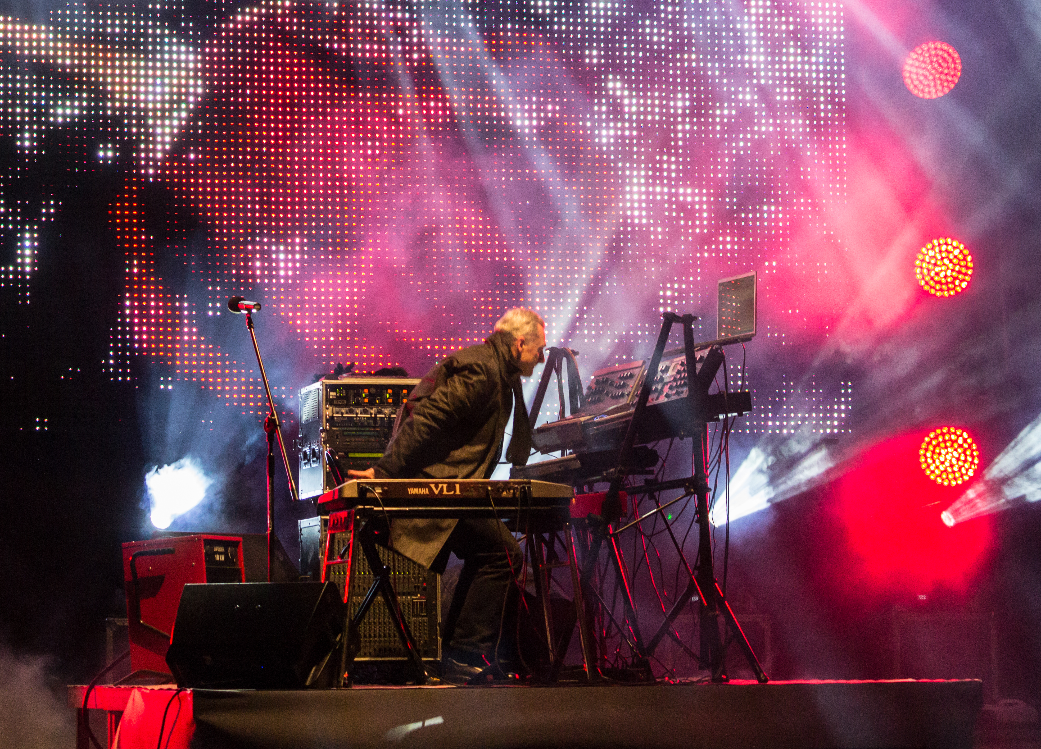 Koncert Marka Bilińskiego podczas I Królewskiego Festiwalu Światła 2013 w Warszawie (Wilanów)